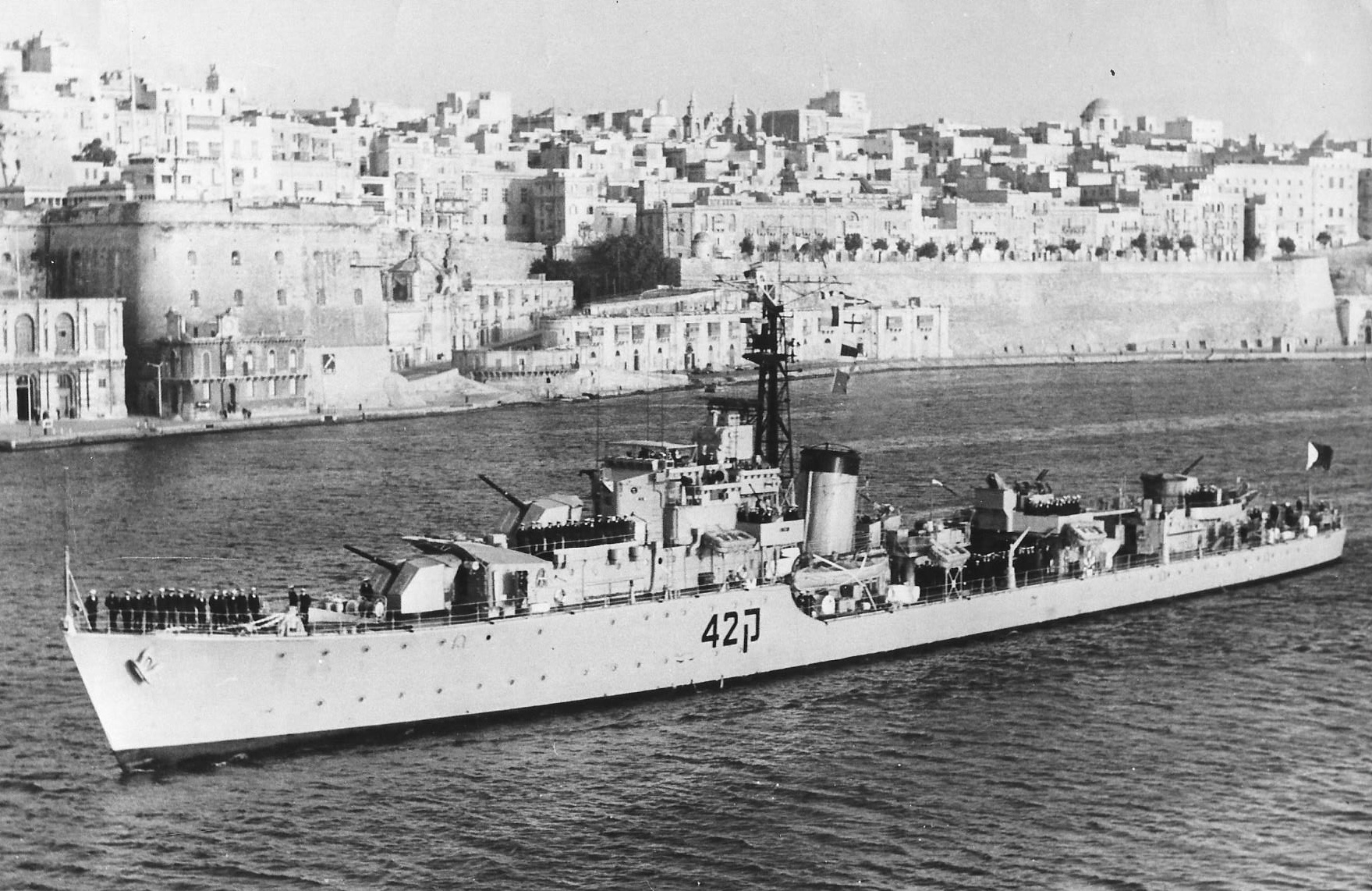 המשחתת אח"י יפו נכנסת לנמל וולטה במלטה בשנת 1959